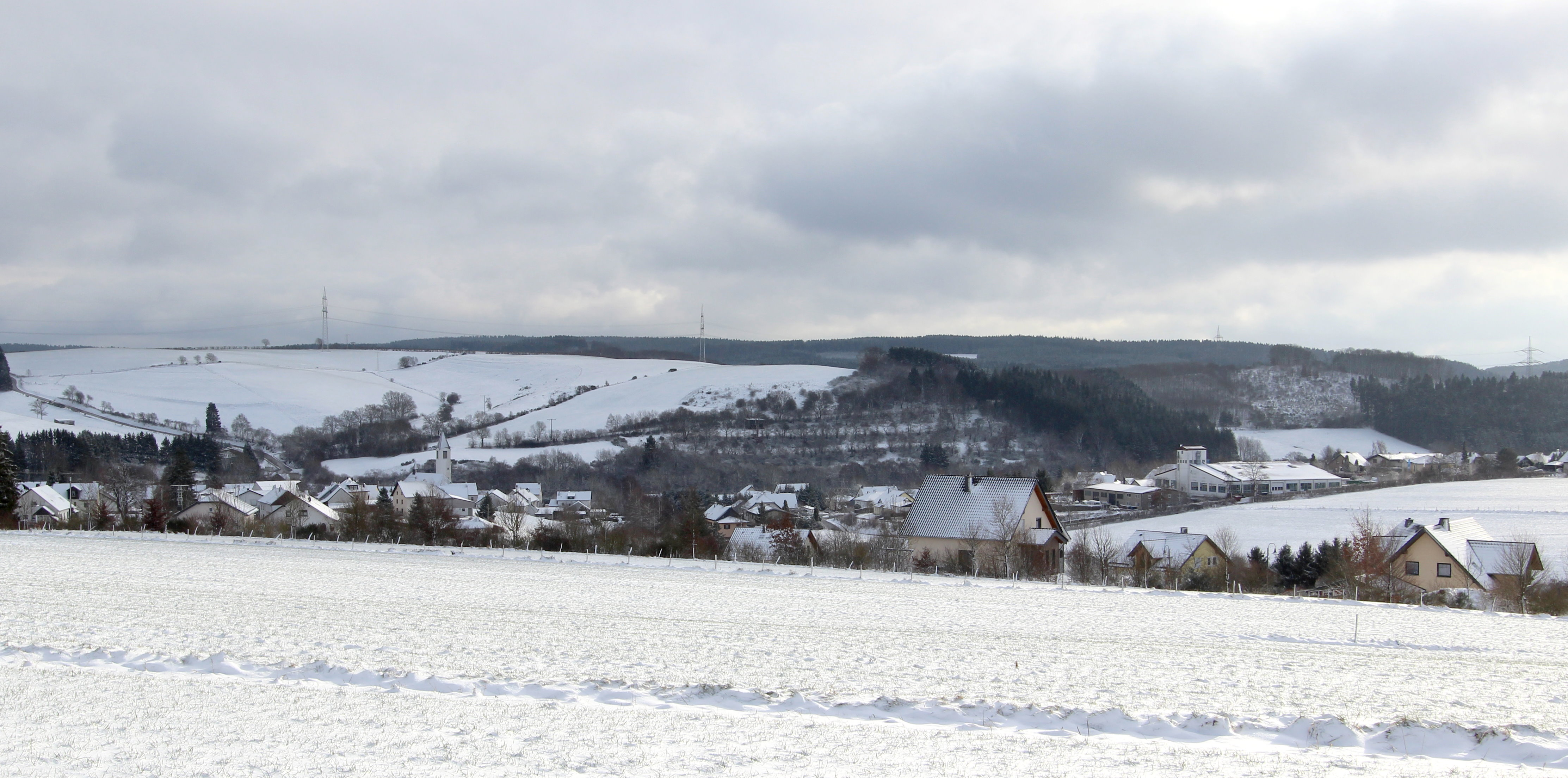 54597 Olzheim, nordwestlich vom Ort. Aufnahme von 2017.